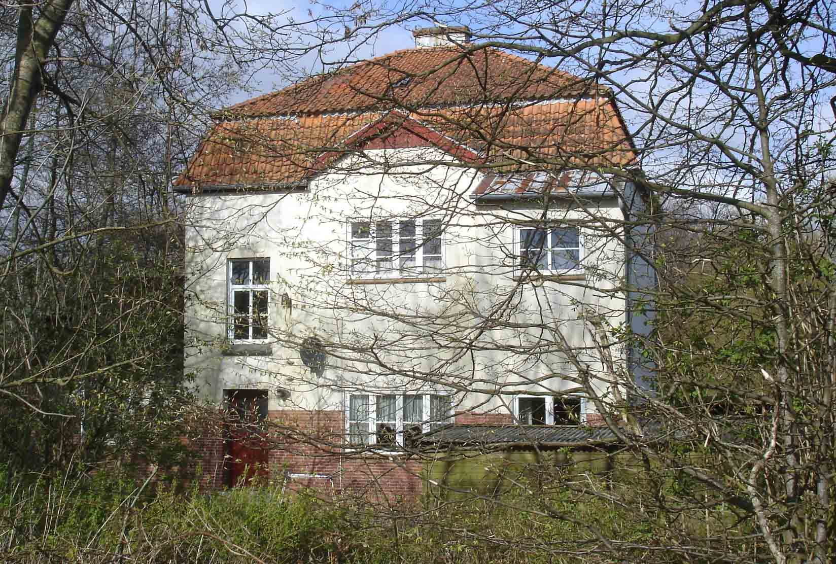 Dynt Station fra vejsiden